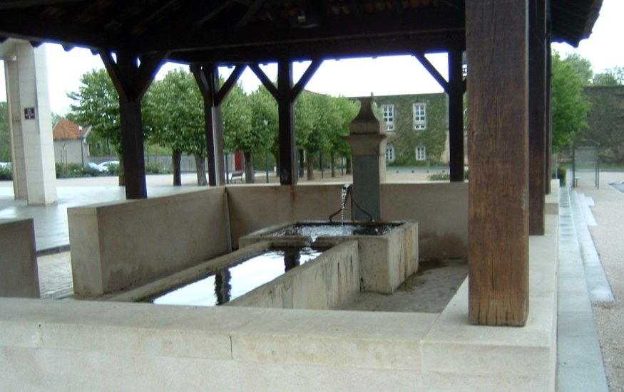 Lavoir situé sur la place de la mairie de Ludres, Meurthe-et-Moselle